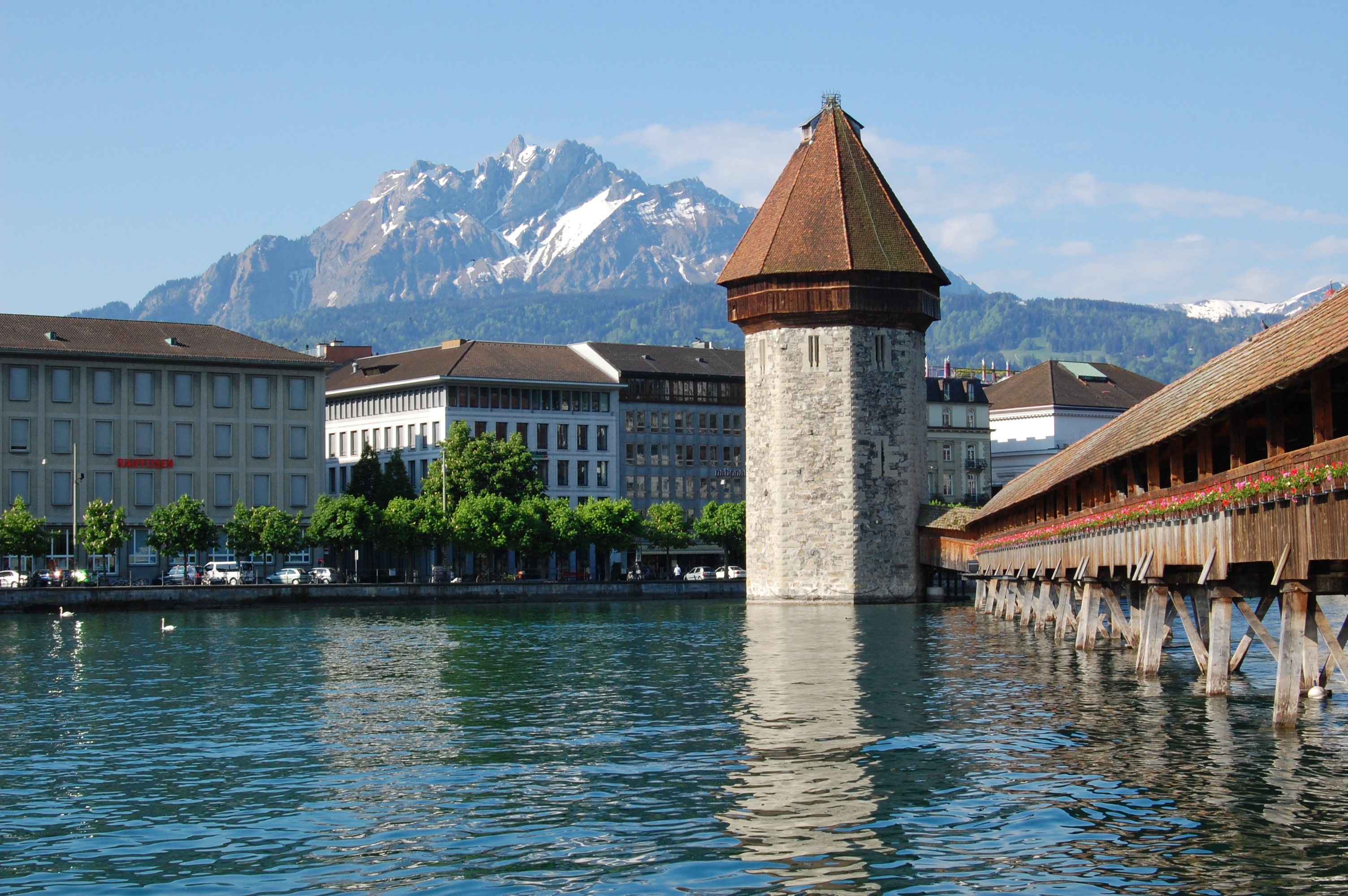 Kapellbrucke in Lucerne